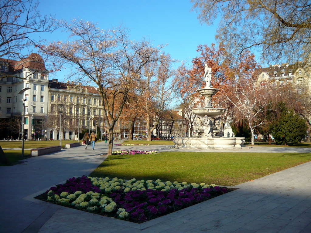 Erzsébet Square, Budapest